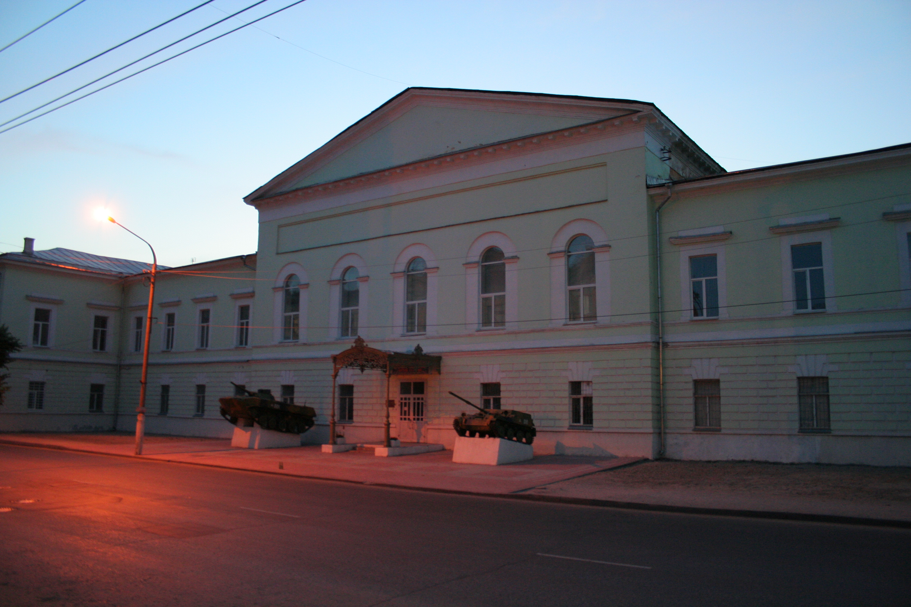 Stadt Rjasan (Russland). Museum der Luftstreitkräfte.